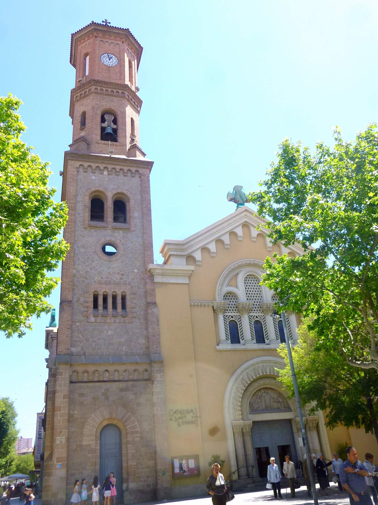 Sant Feliu de Llobregat (Barcelona) - Catedral de Sant Llorenç